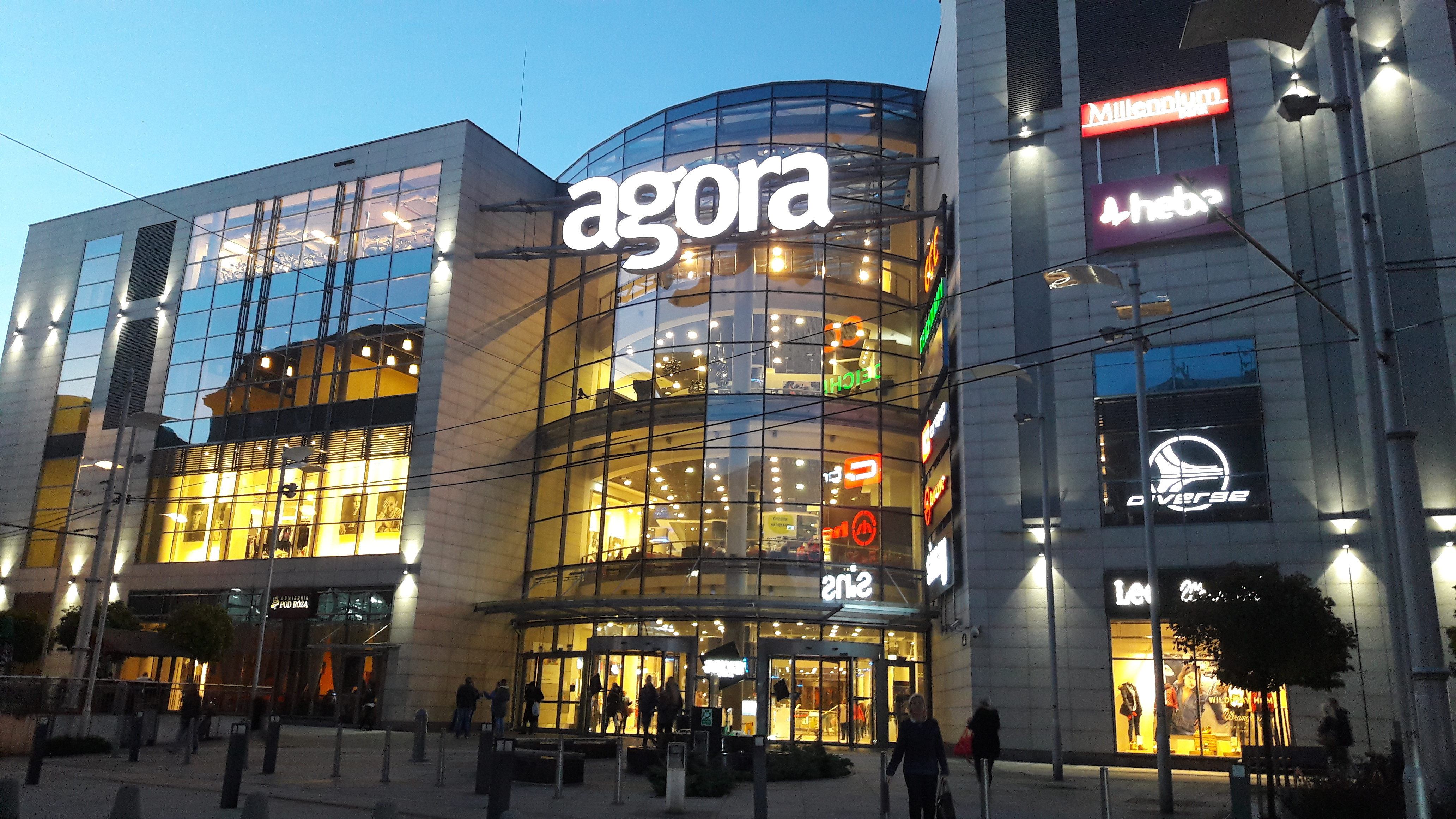 Galeria Agora w Bytomiu